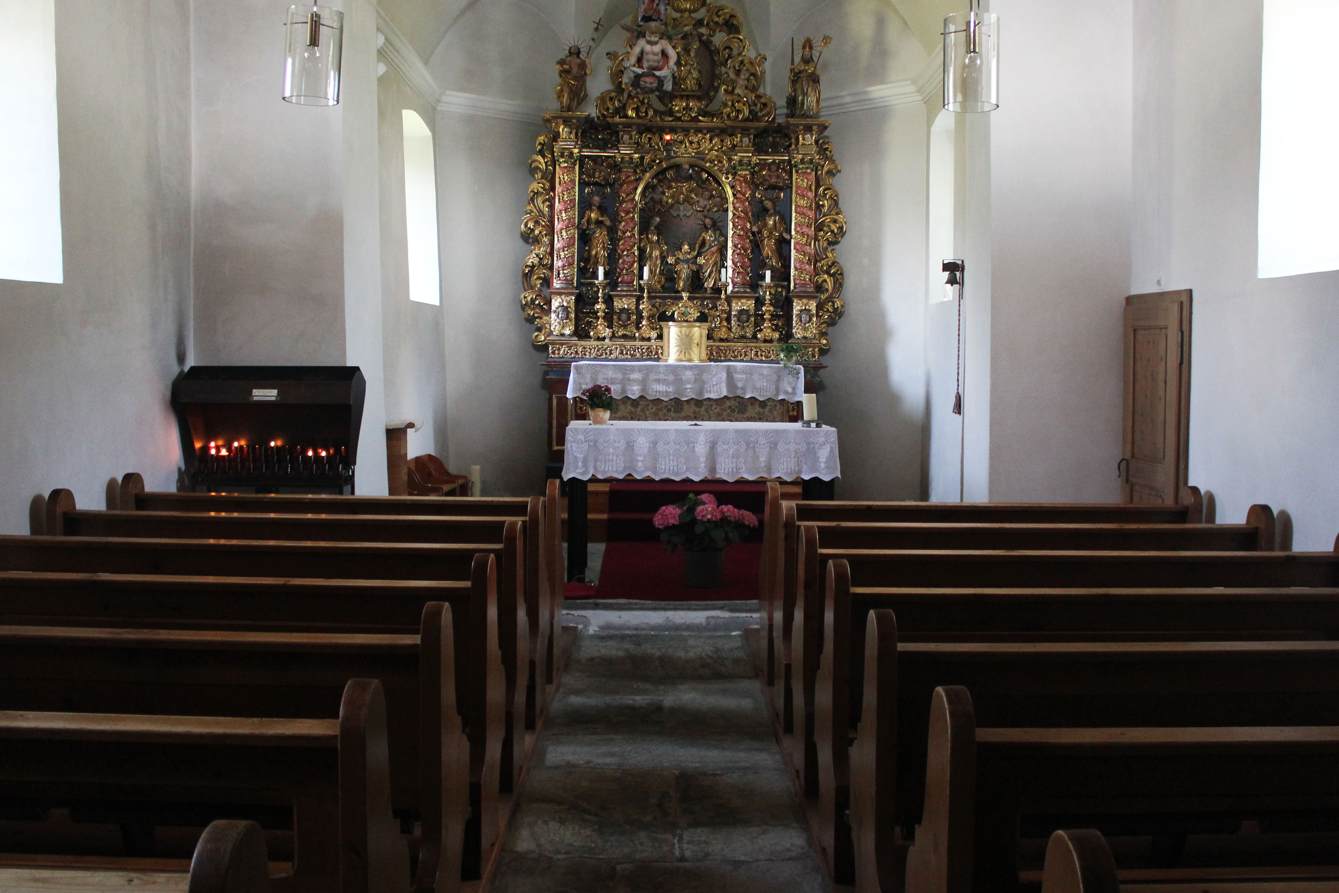 Das Innere der Kapelle in Gspon (Baujahr 1691) mit Barockaltar